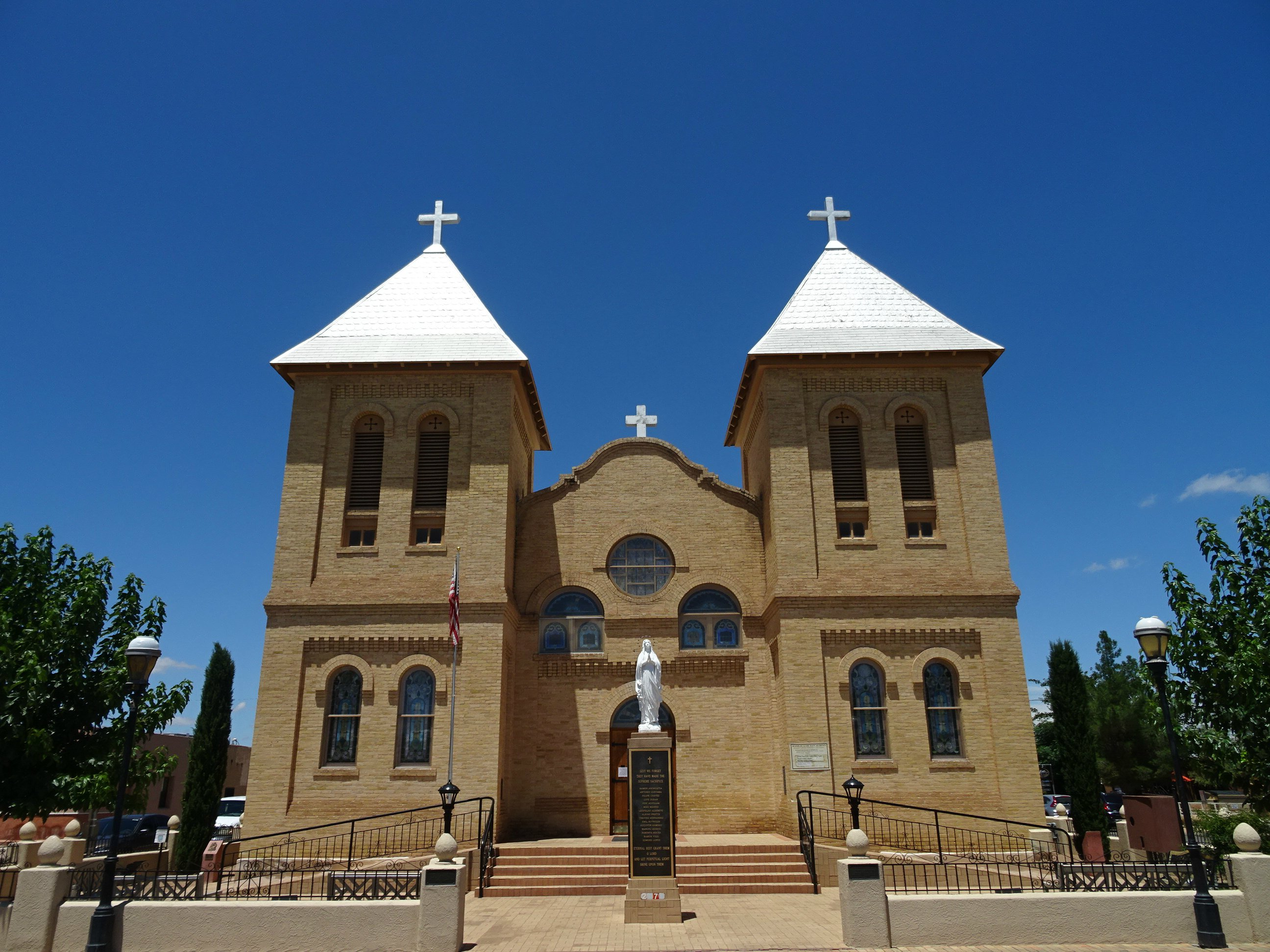 Mesilla NM icon